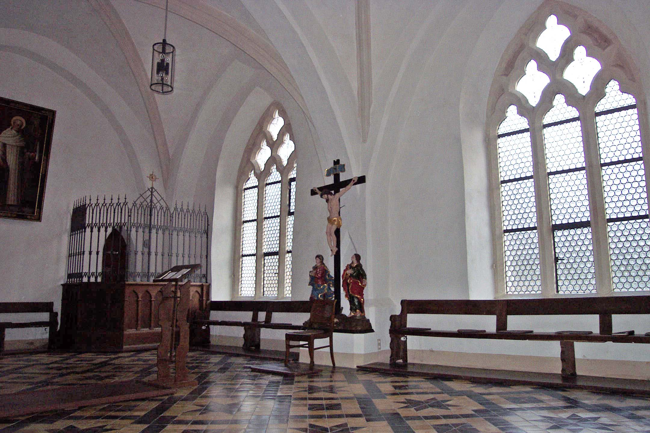 Sala capitular en el monasterio cisterciense St. Marienstern en Panschwitz-Kuckau, Alemania